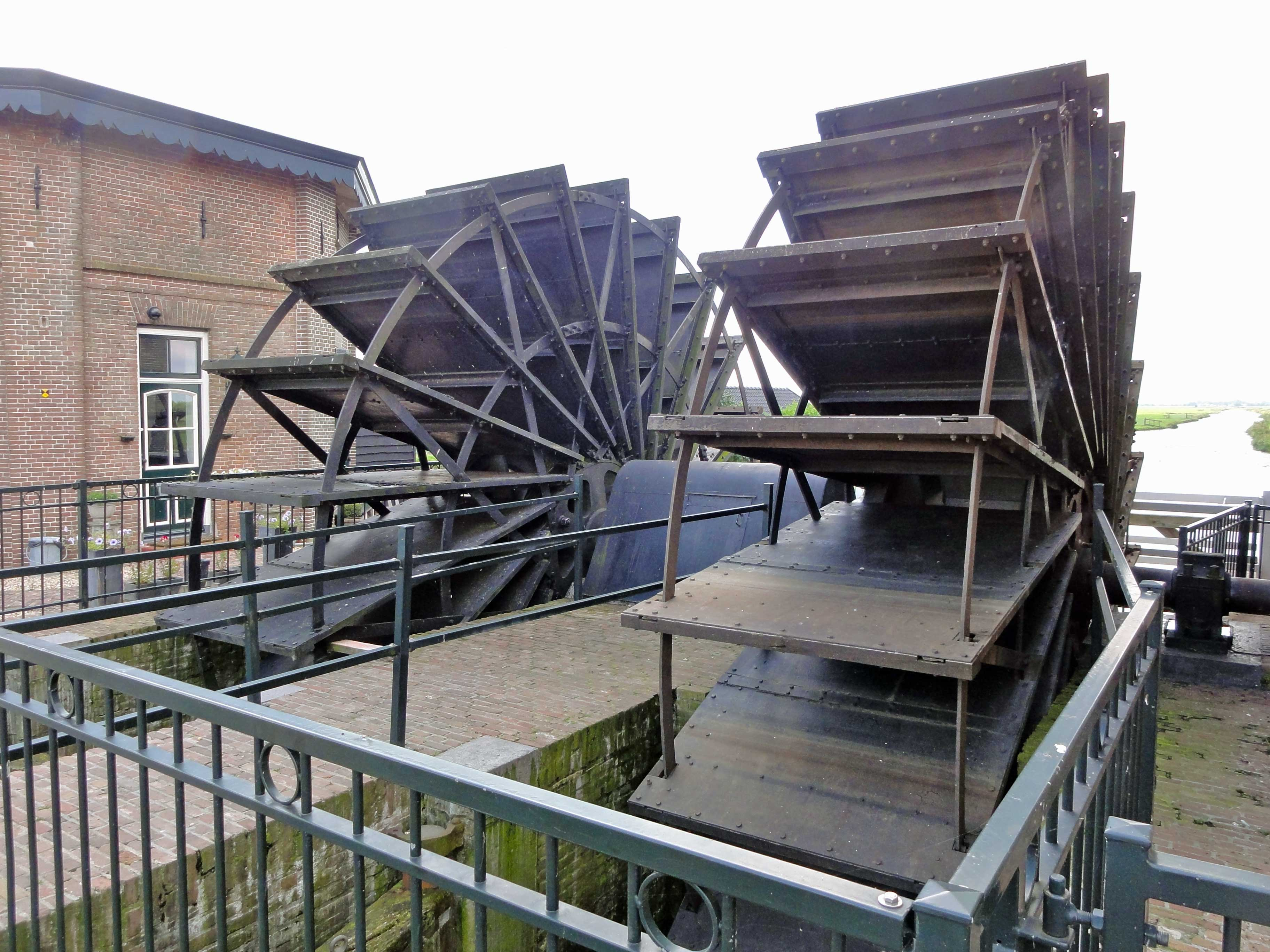 Stoomgemaal Hertog Reijnout van de polder Arkemheen